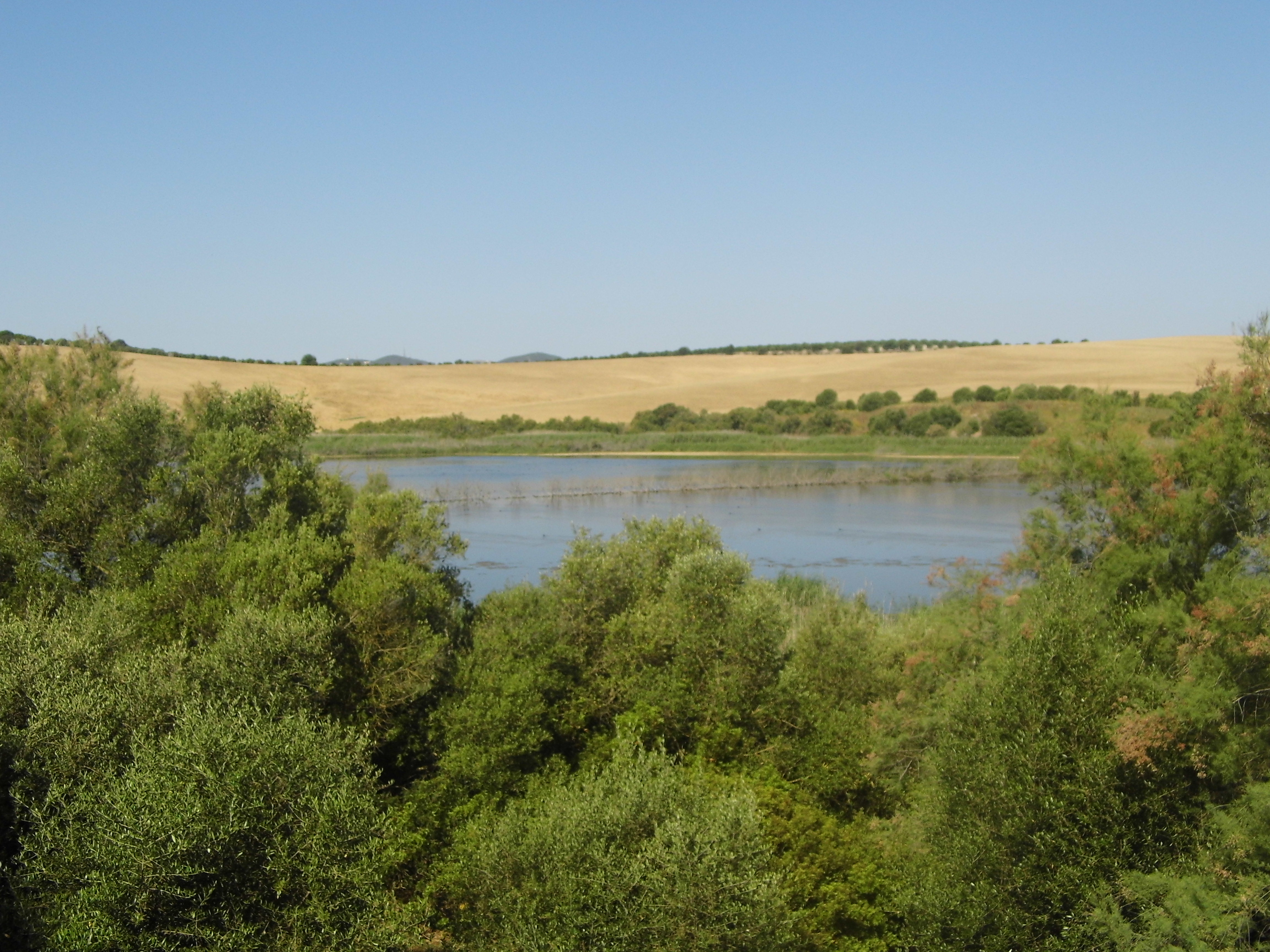 Complejo endorreico de Espera This is a photography of a Site of Community Importance in Spain with the ID: ES0000026. Natura2000 entry, EEA entry